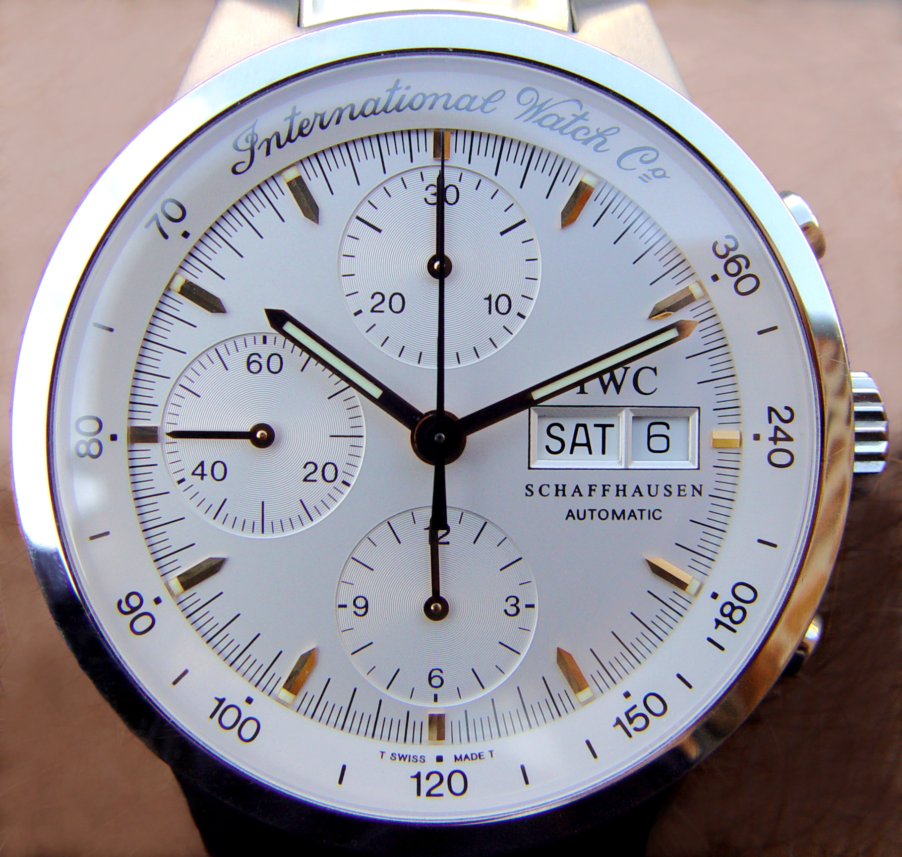 IWC ref. 3707 (dial)